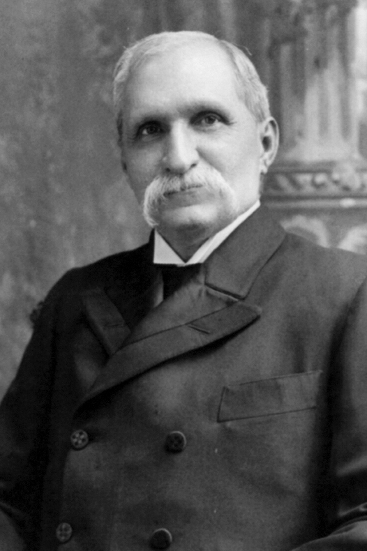 fi 1054 Obaldía, José Domingo de